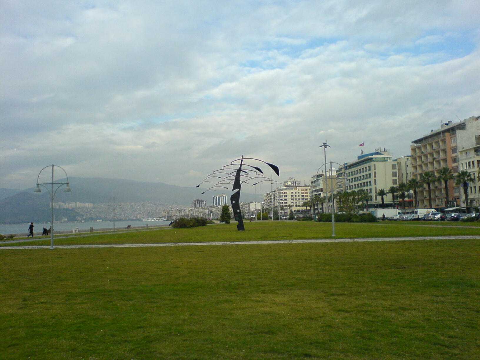 Kordonboyu